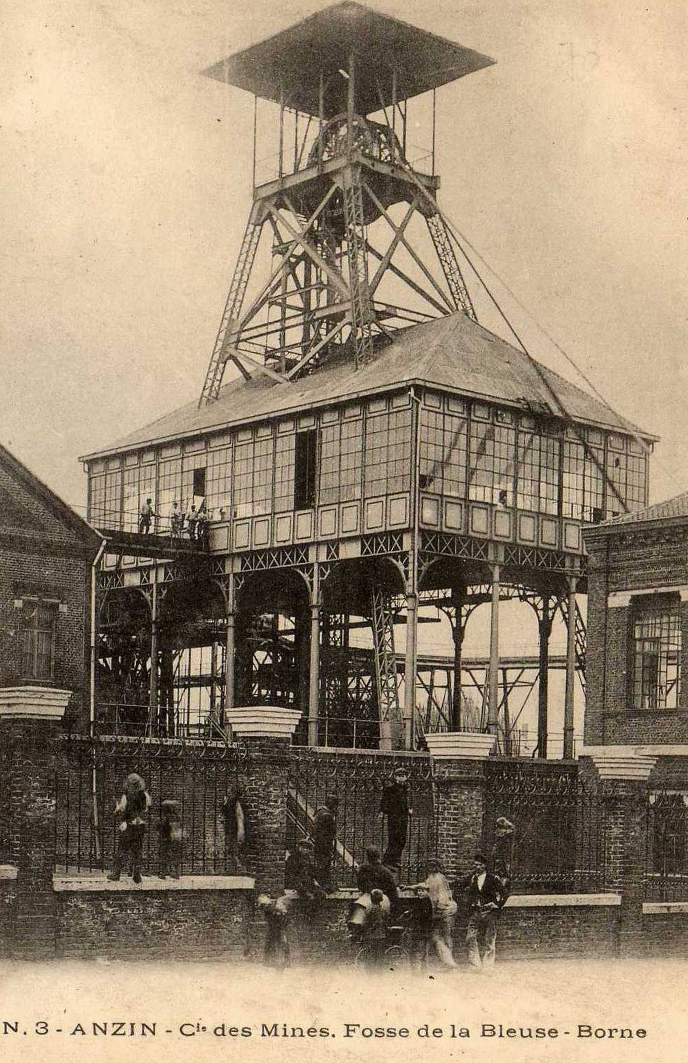 Fosse Bleuse Borne de la Compagnie des mines d'Anzin, Anzin, Nord, Nord-Pas-de-Calais, France.